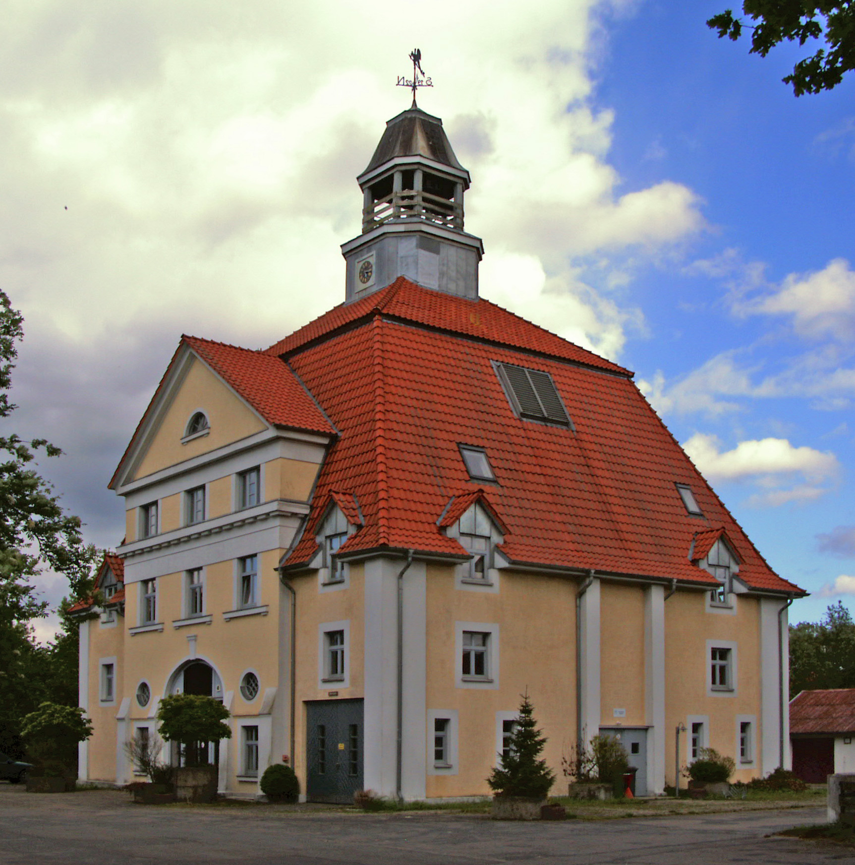 Feuerwehrhaus in Hahnenhorn, Ortsteil von Müden (Aller), Landkreis Gifhorn. Ursprünglich Torhaus vom Gut Hahnenmoor.